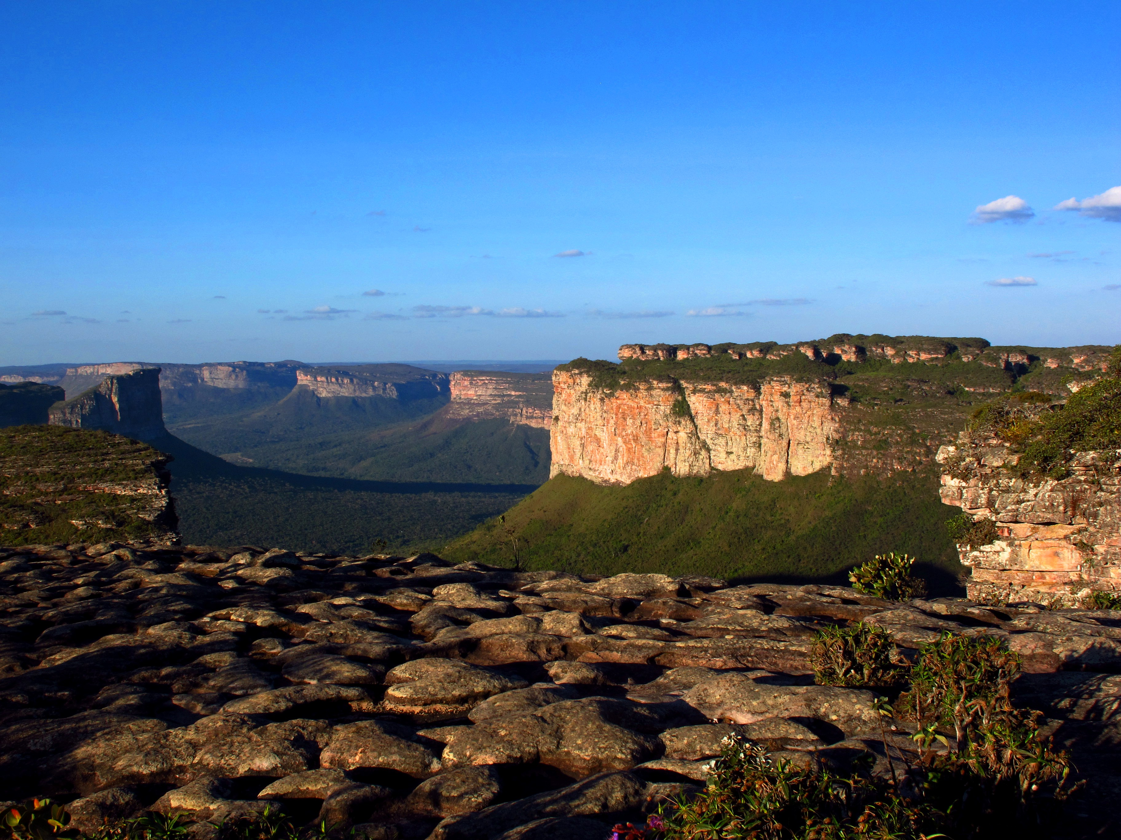 Chapada Diamantina a partir do Morro do Pai Inácio, Bahia, Brasil.